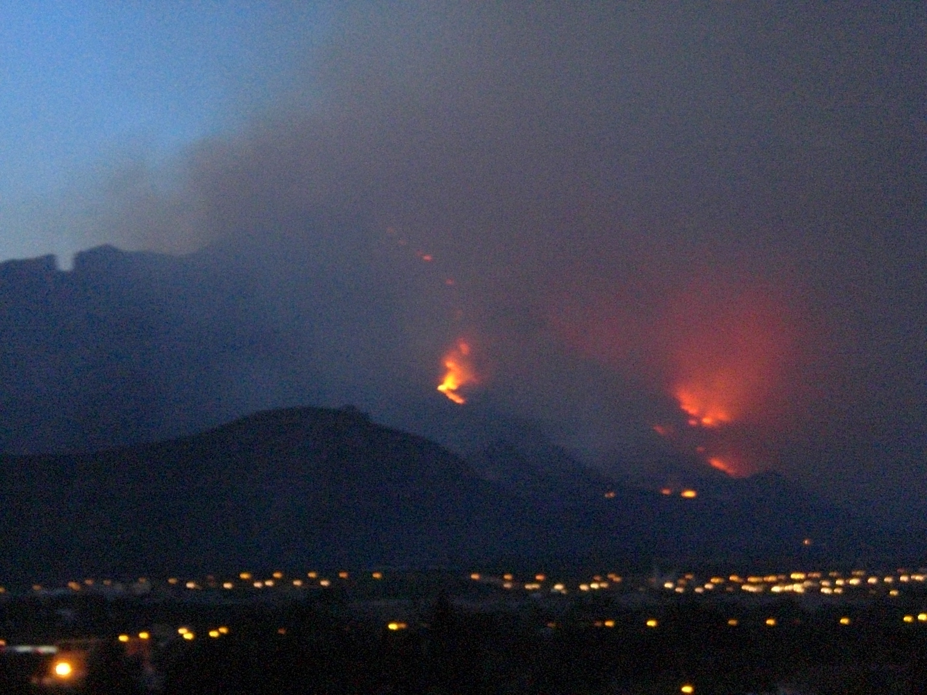 Imagen del incendio producido en el Puig Camapana el 24 de Enero de 2009.